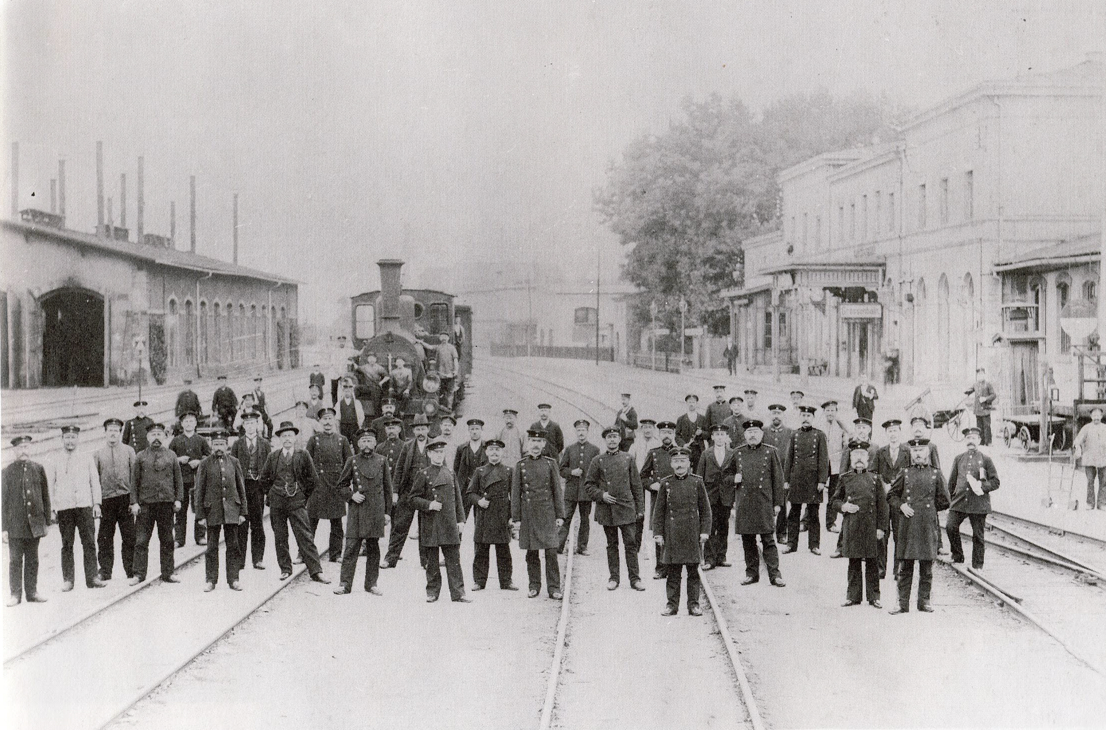 Cottbuser Bahnnhof in Großenhain um 1900